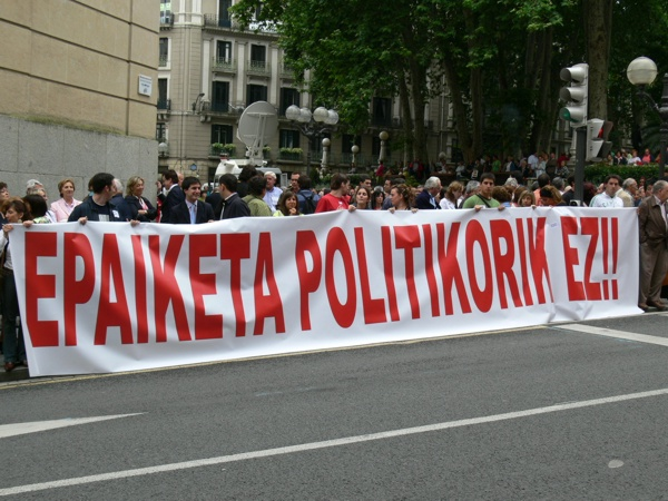 Epaiketa politikoriz ez kozentrazioa.